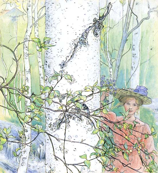 Vårentitle QS:P1476,sv:"Våren" label QS:Lsv,"Våren"